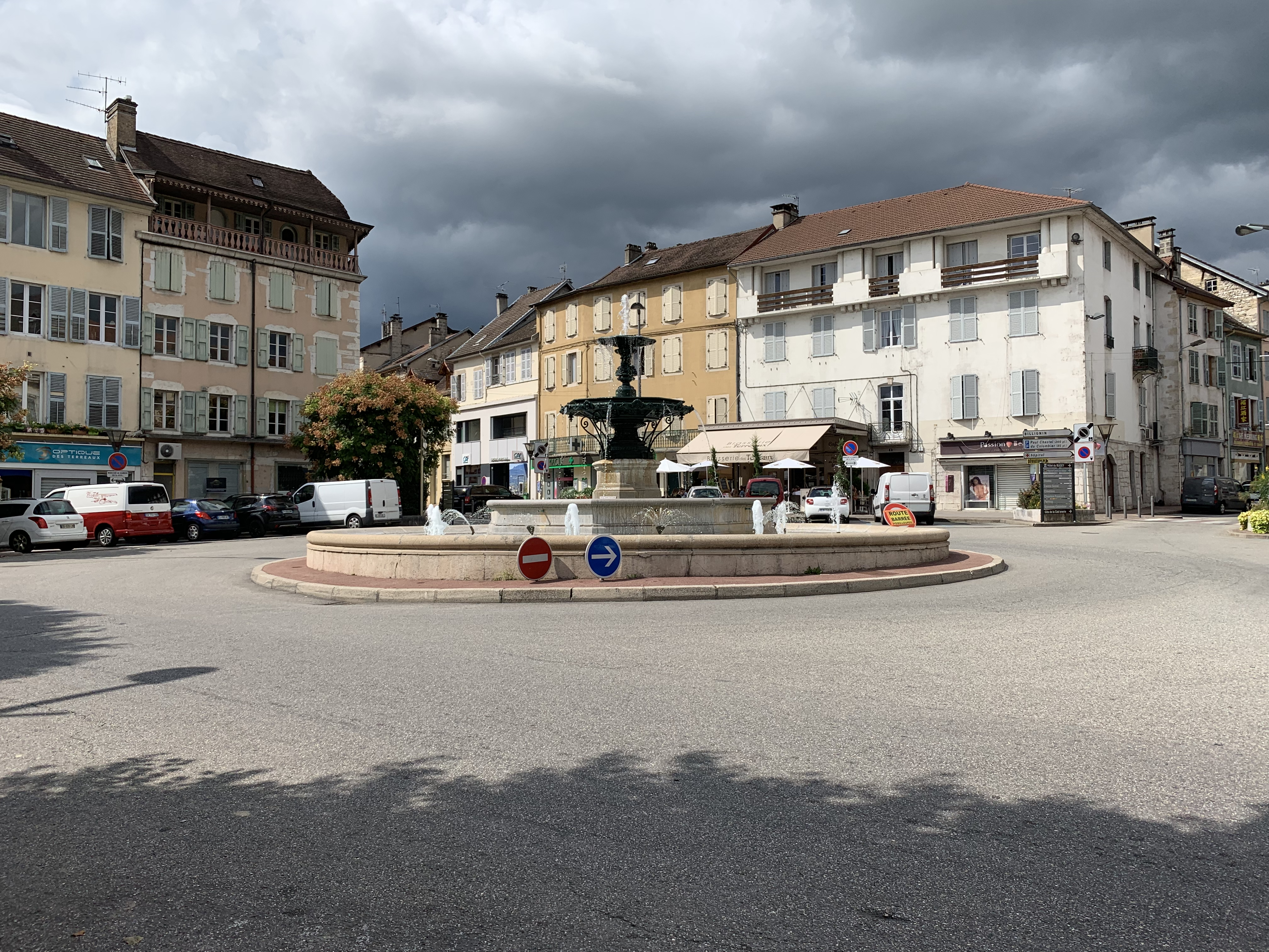 Place des Terreaux à Belley en septembre 2019.